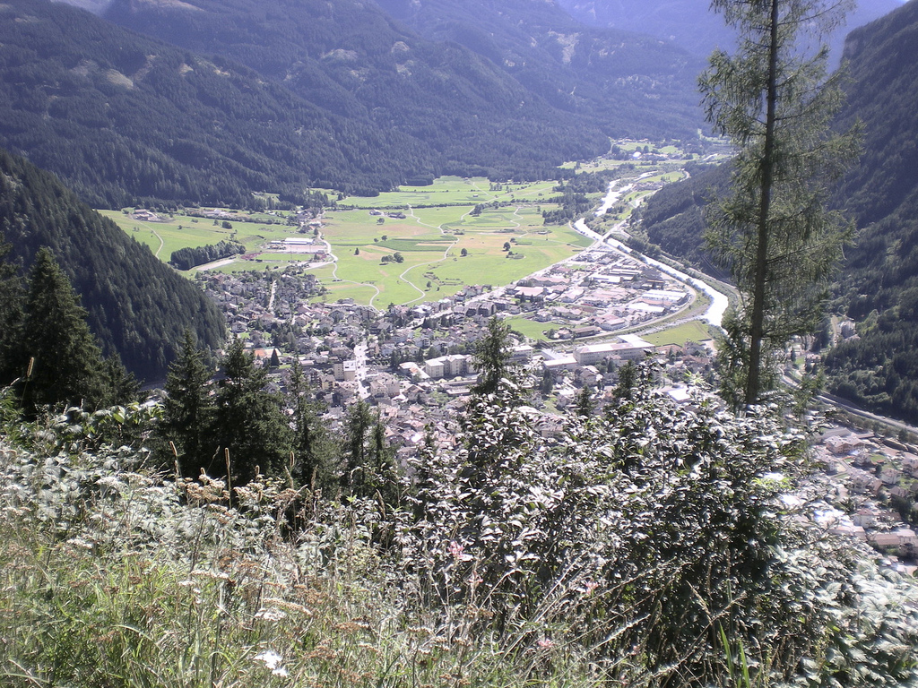 Predazzo (TN)